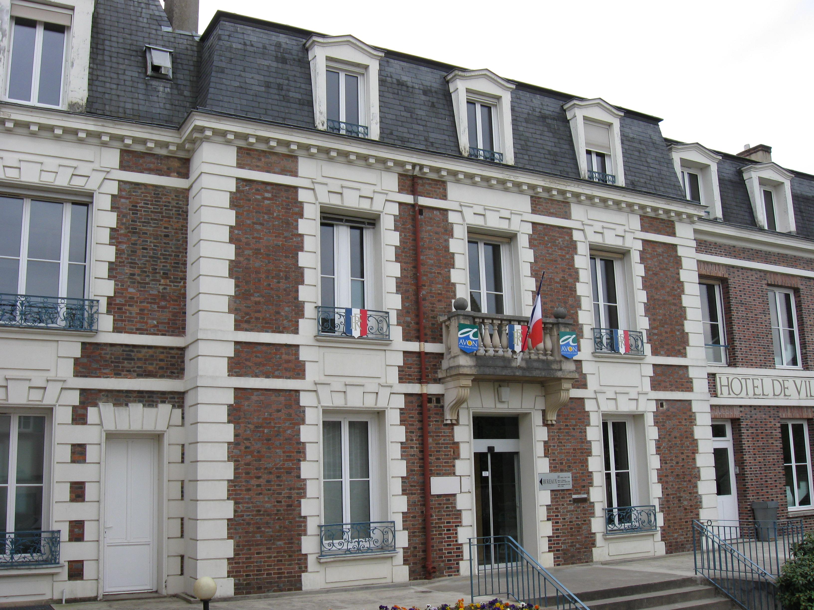 Mairie d'Avon. (Seine-et-Marne, région Île-de-France).